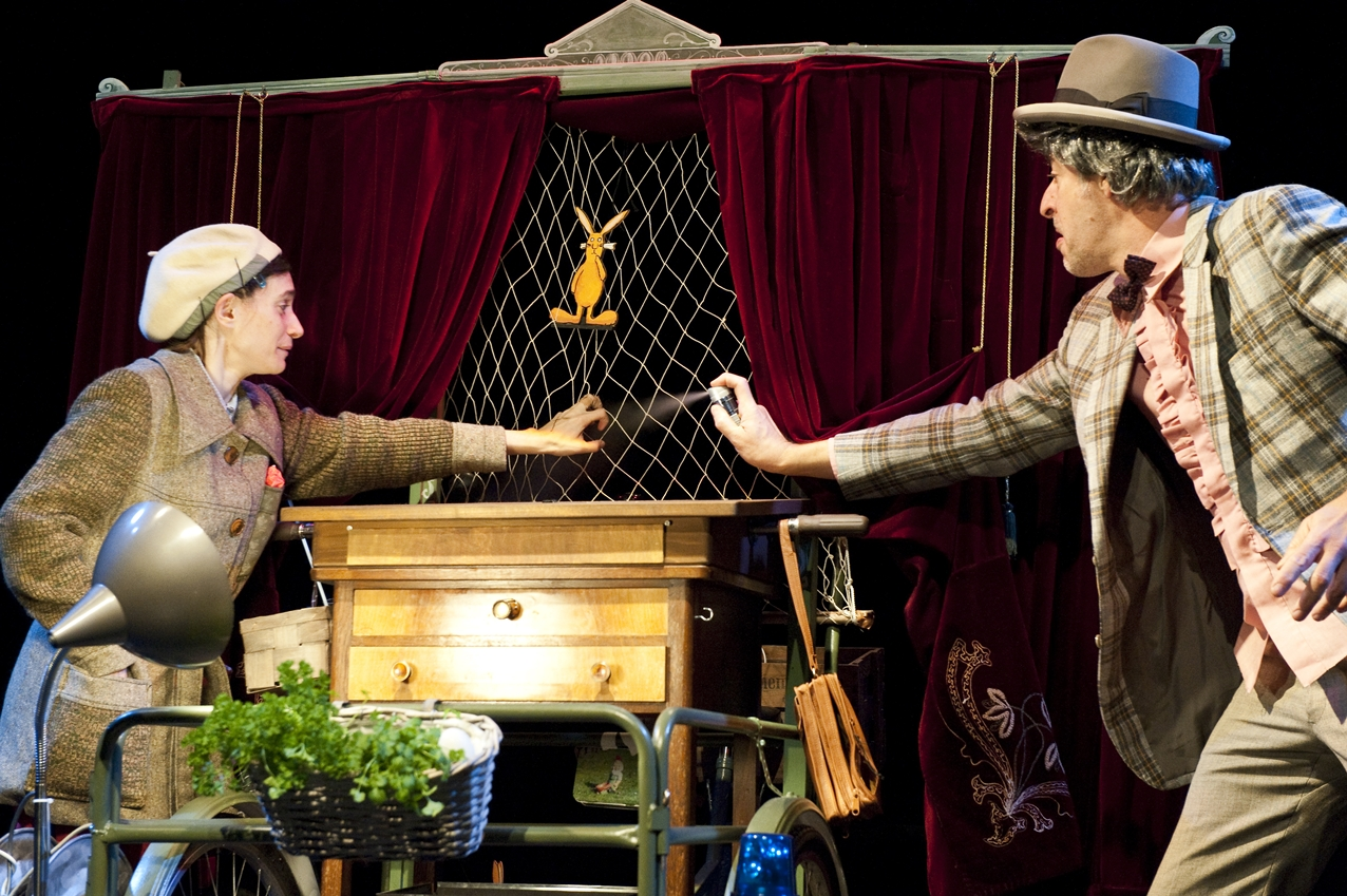 Theater Mummpitz 2010: He Duda